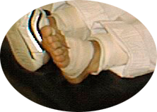 Getapter Sportler